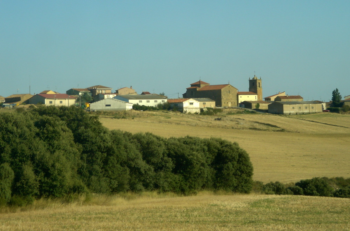 Kripan (Araba)